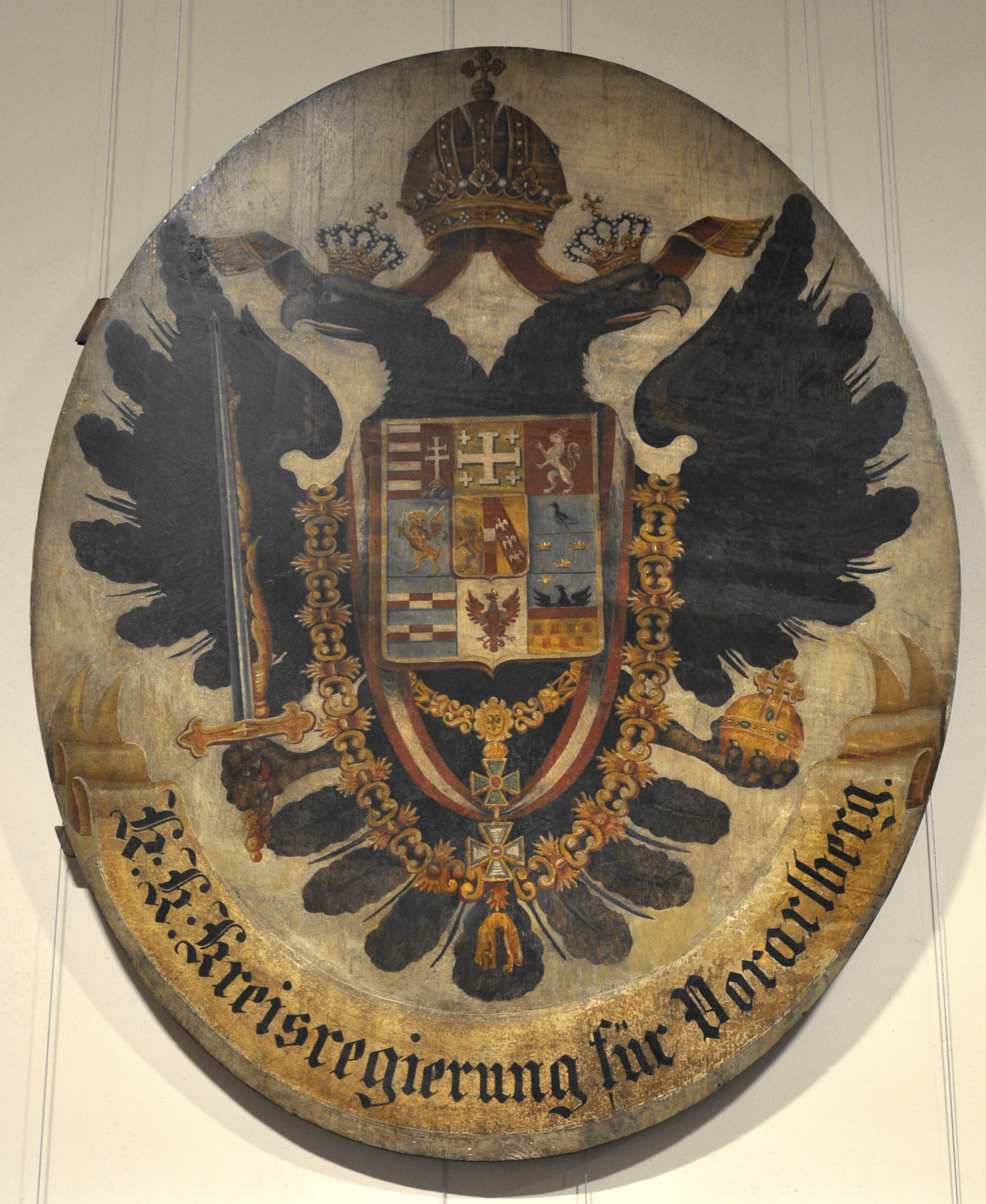 K. k. Kreisregierung für Vorarlberg mit kaiserlichem Wappen, Gemälde auf Holz, um 1850 Bregenz, Vorarlberg Museum vorarlberg museum Native namevorarlberg museumLocationBregenz, Vorarlberg, AustriaCoordinates47° 30′ 16″ N, 9° 44′ 48″ E Established1857WebsiteVorarlberg Museum website